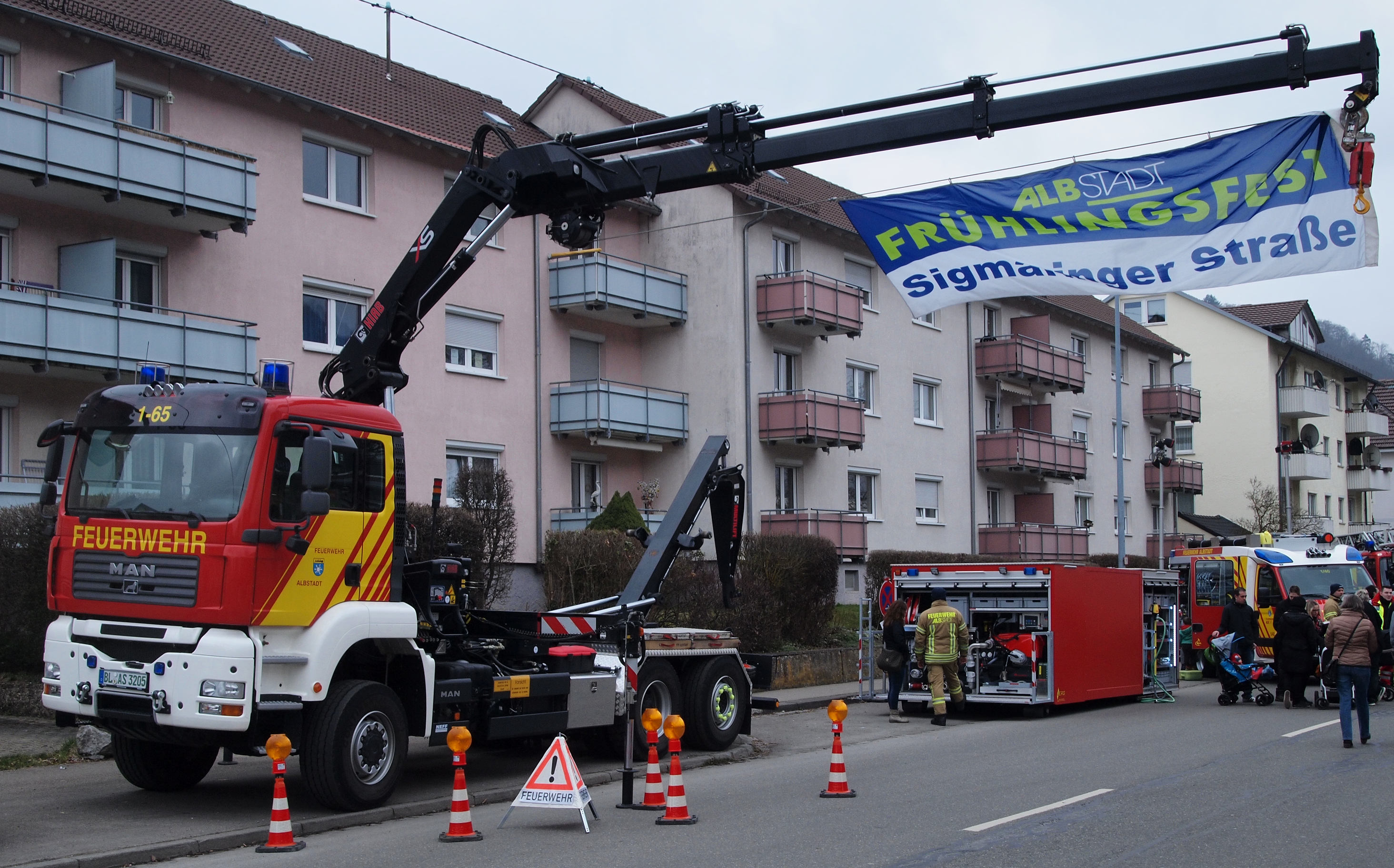 Wechselladerfahrzeug der Feuerwehr Albstadt [1] mit ausgefahrenem Fahrzeugkran, Ladehaken und abgeladenem Abrollcontainer. Ausgestellt beim Frühlingsfest in der Sigmaringer Straße in Ebingen.